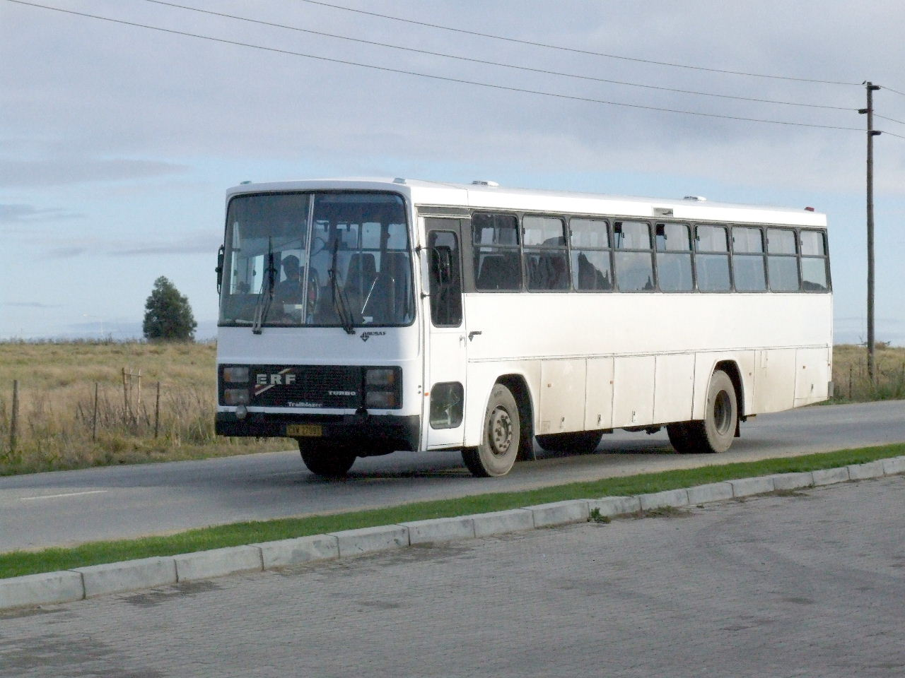 ERF Trailblazer